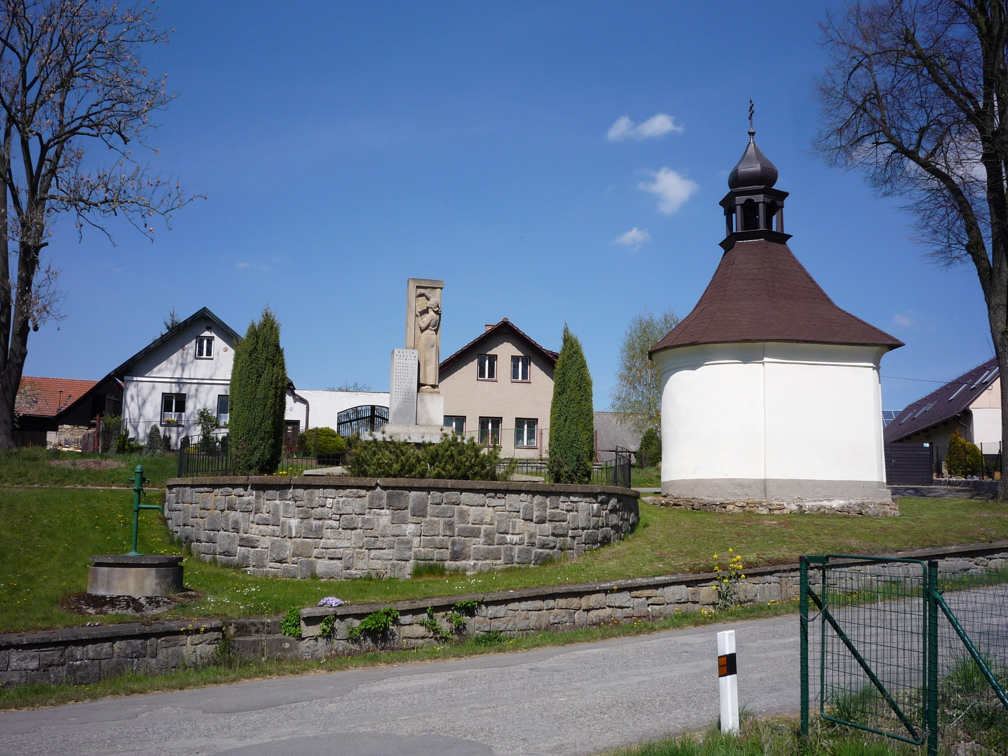 Autor fotografie Jiří Zelenka. Toulky Vysočinou. Cestou krajem básníka a malíře Jana Zrzavého. Obec Vadín. Okr. Havlíčkův Brod.